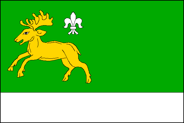 vlajka, Malá Losenice, okres Žďár nad Sázavou